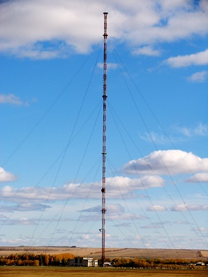 Высота 330 метров. Самое высокое сооружение в Алтайском крае.